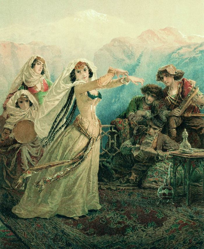 Il ballo di Tamara visto da Mihály Zichy